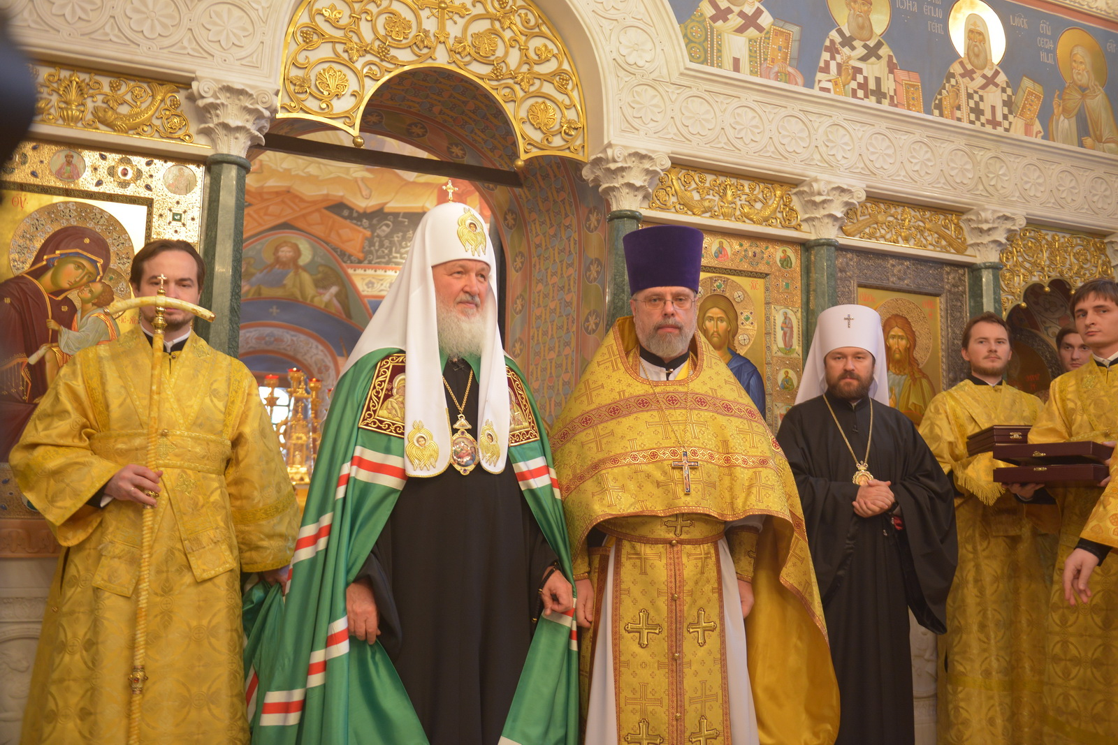 Получение докторского креста Григорием Григорьевым